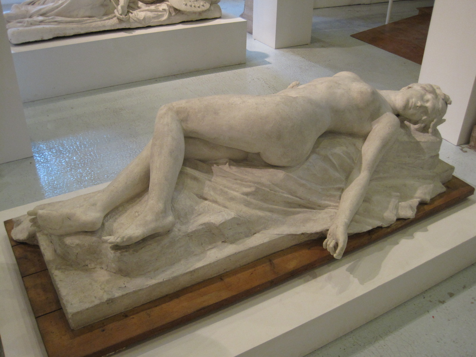 Musée des Beaux-Arts de Lons-le-Saunier - Sculpture en plâtre originale de Sappho endormie par Marguerite Gagneur dite Marguerite Syamour en 1897